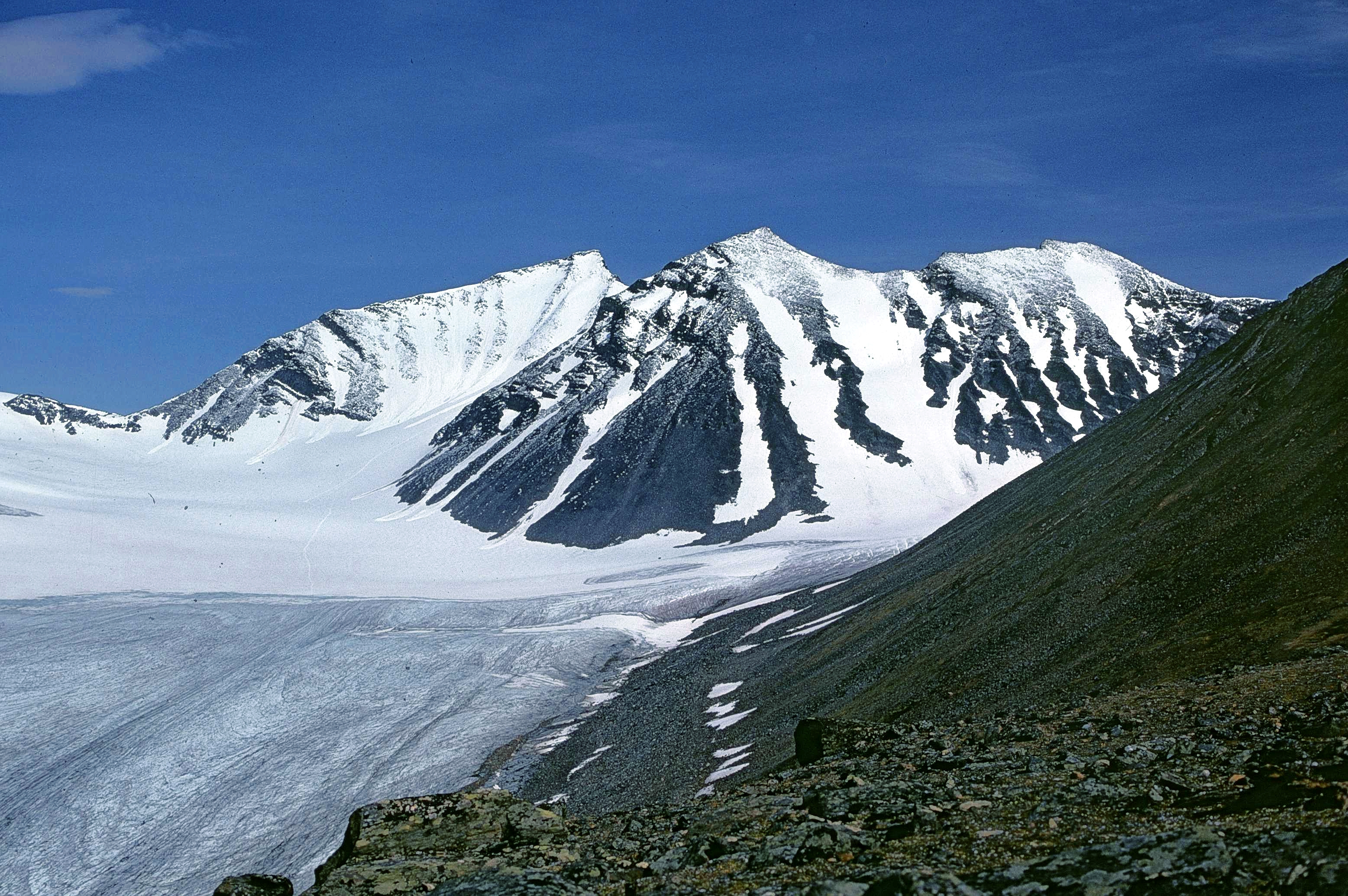 högsta topparna i Sarektjåkkomassivet